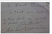 Farrère